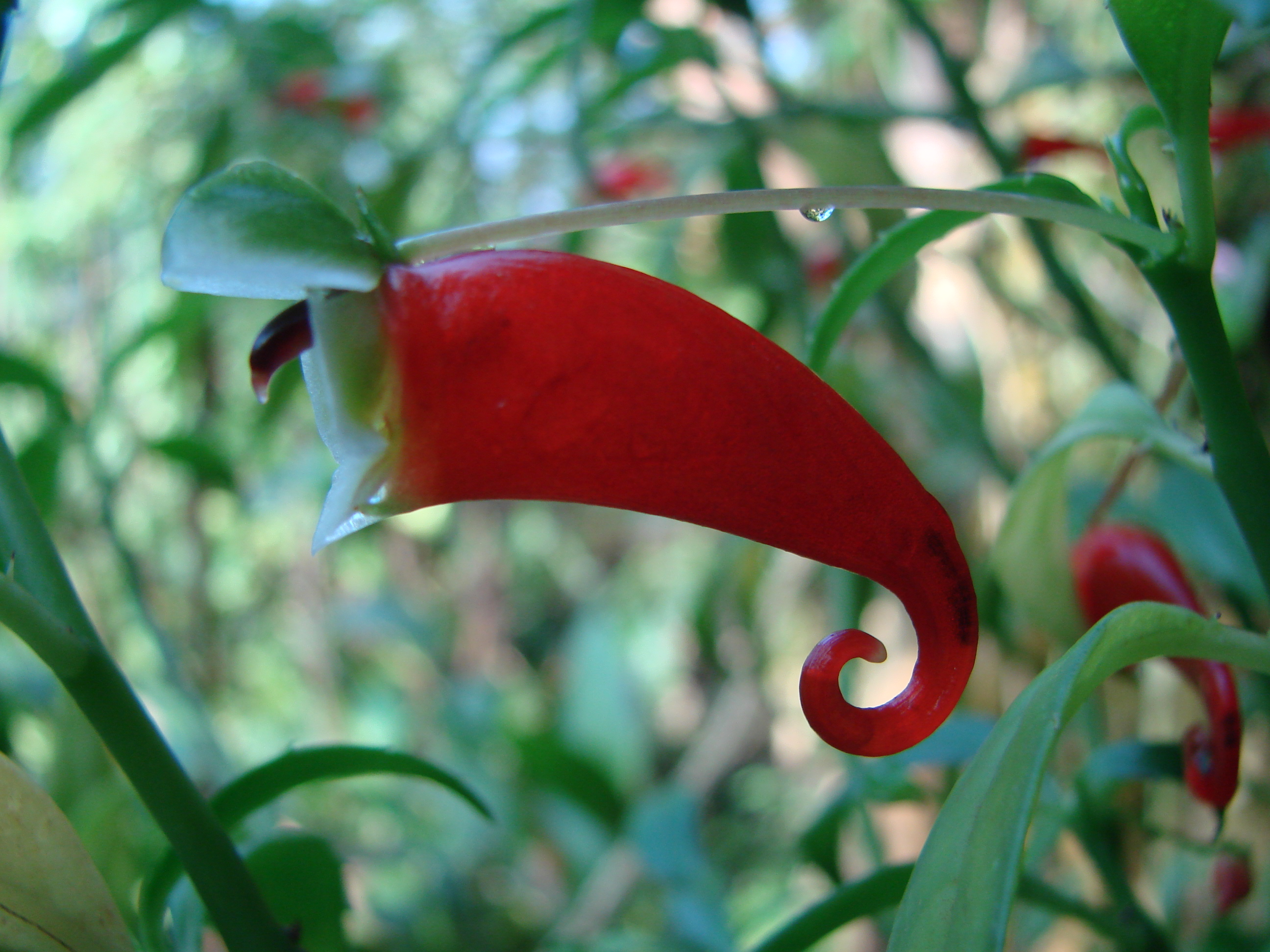 Jardin botanique de l'Université de Zurich (Suisse) : Impatiens paucidentata Dewild.